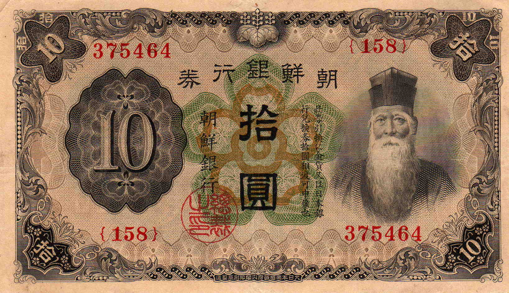 日本の植民地支配していた当時の朝鮮銀行が1944年に発行した紙幣の一つ。Korean yen